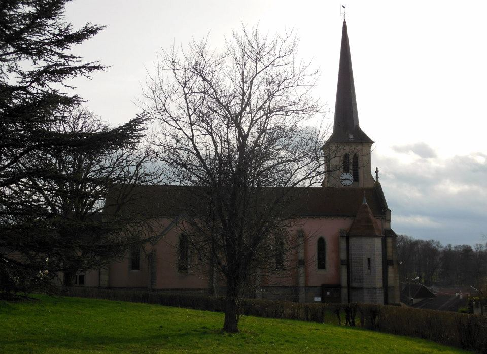 Photographie de l'église de l'Assomption de Falletans (Jura).